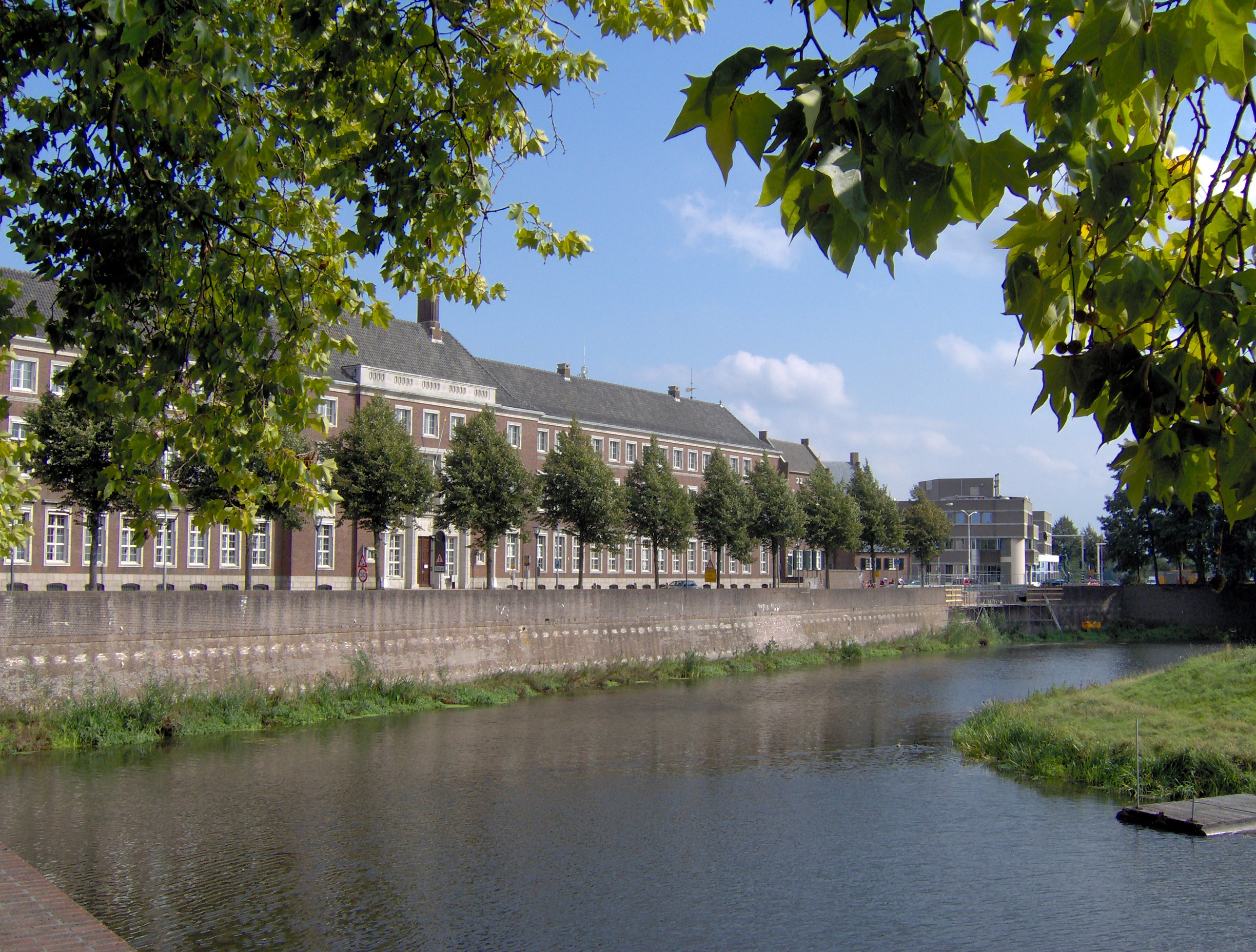 Stadsmuur Den Bosch, Nederland